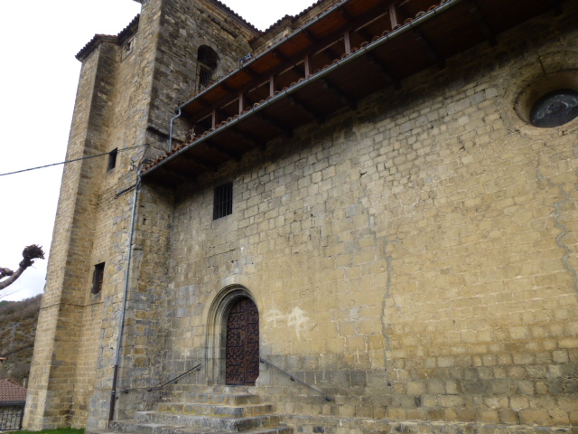 Gardeko eliza